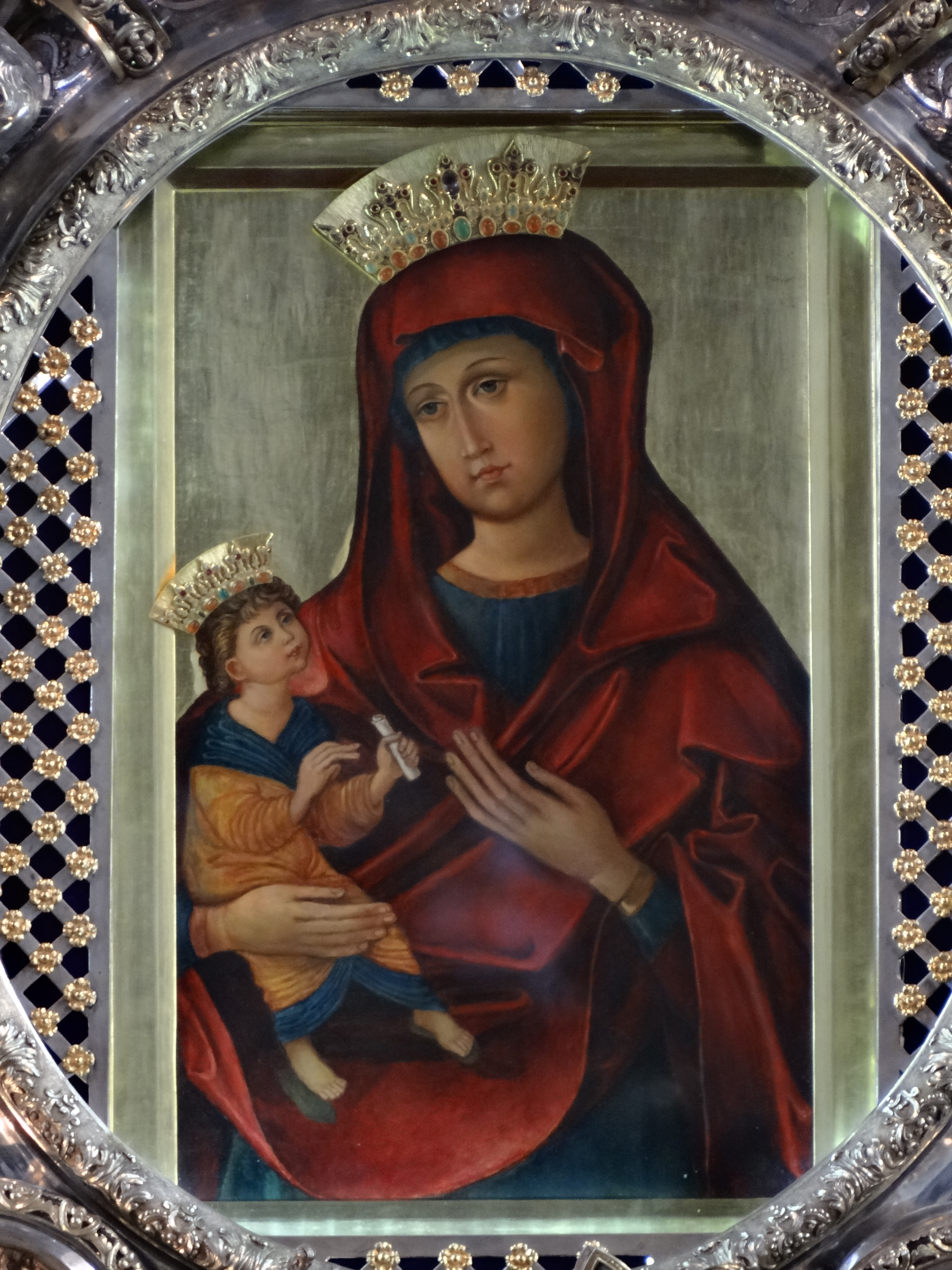 Krzeszów, kościół, ob. par. p.w. Wniebowzięcia NMP, 1728-1735